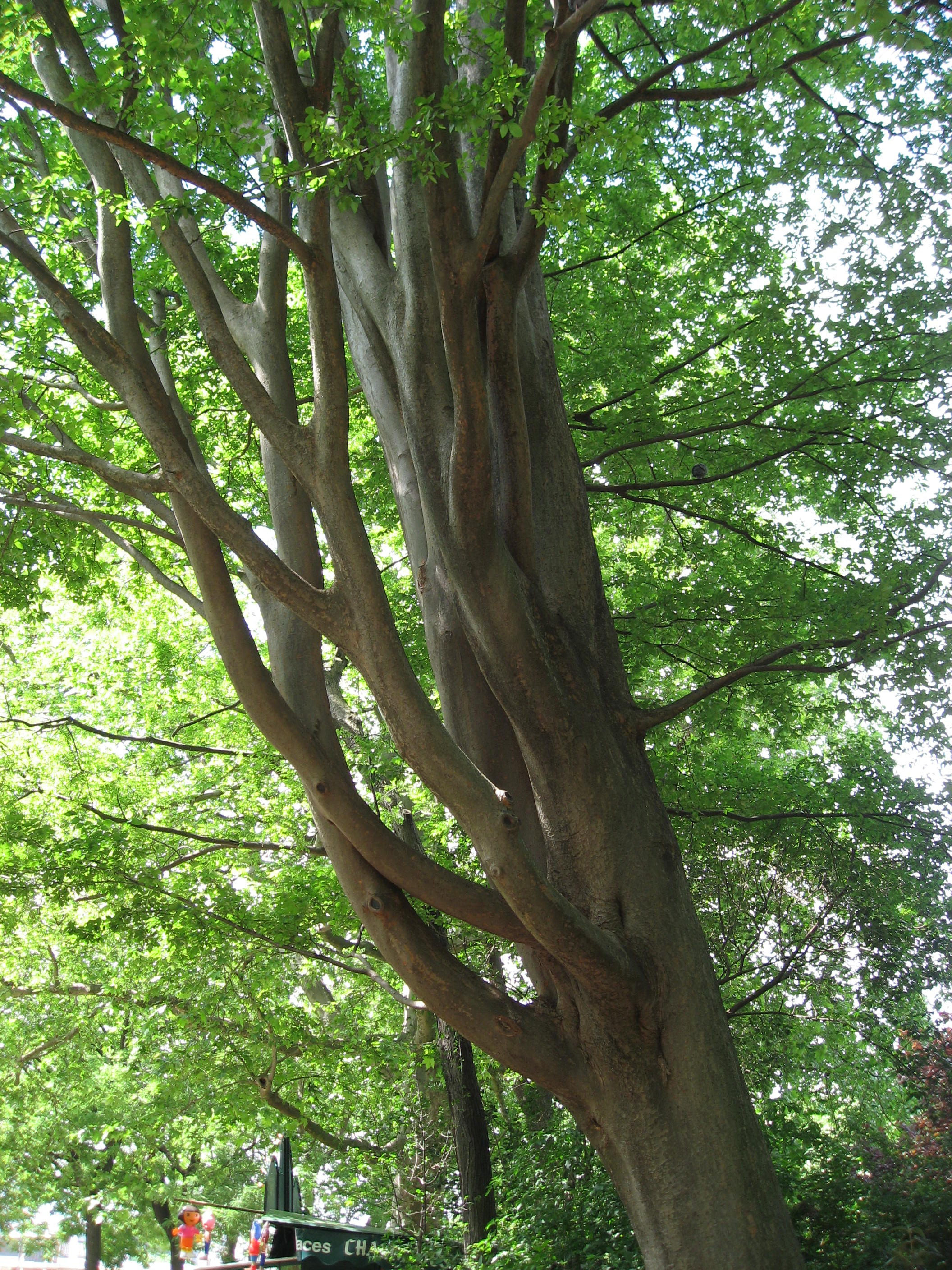 Zelkova carpinifolia in Square des Batignolles Map: 48° 53' 15" N 2° 18' 59" E